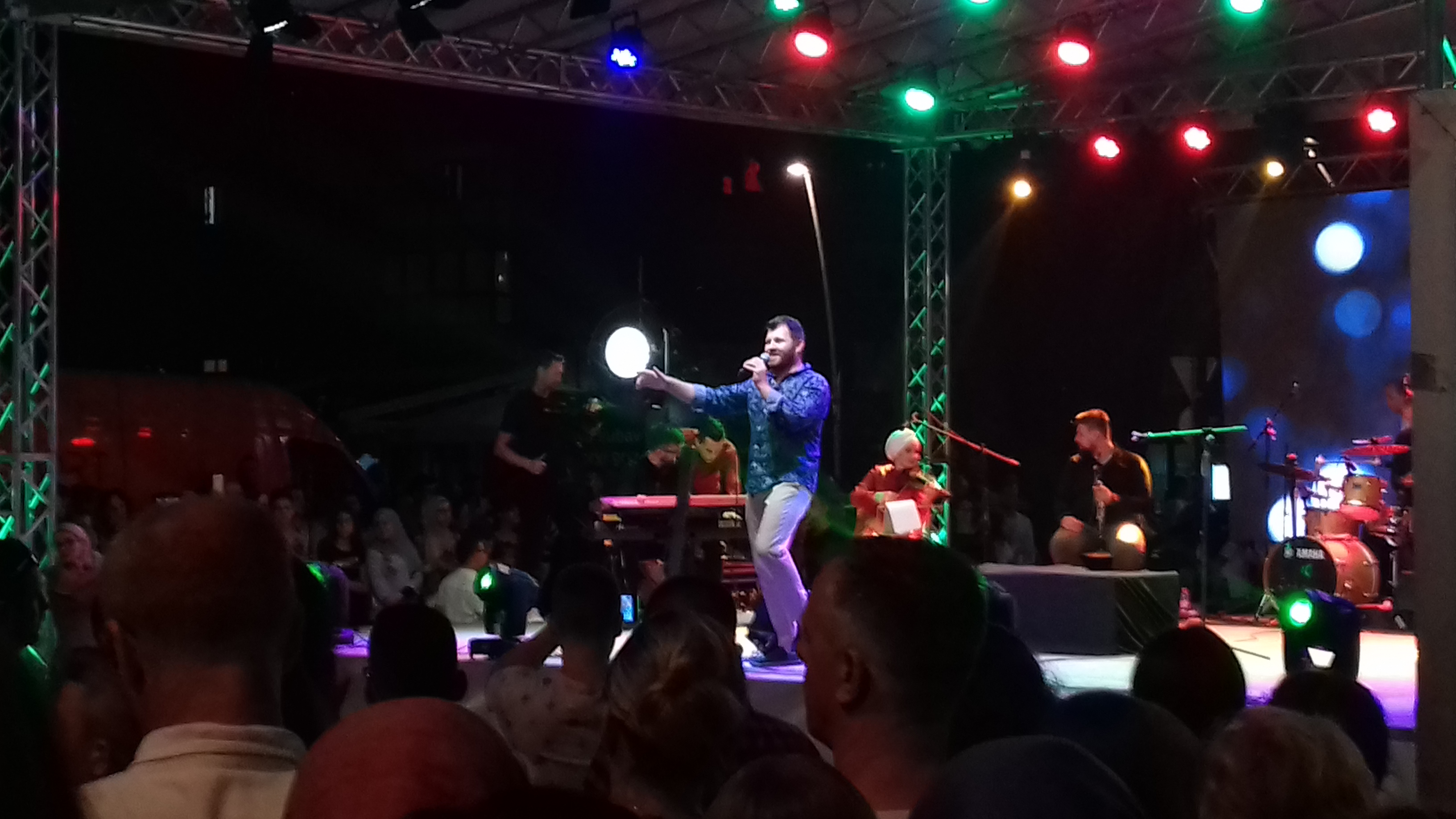 Бајрамска свечаност у Зеници 2019, Армин Музаферија и гости (Елдин Хусеинбеговић, хфз. Азиз Алили и др.)